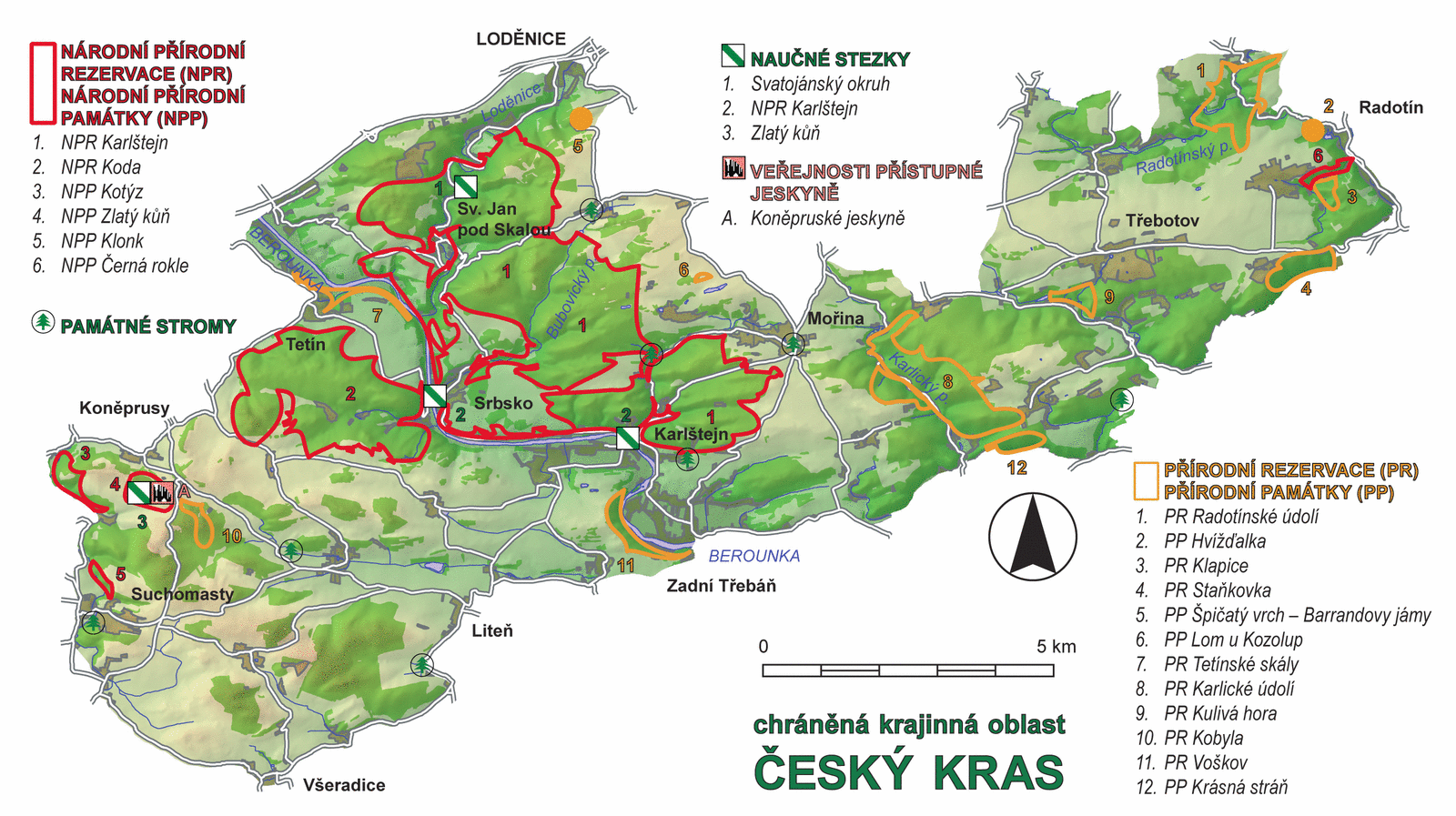 Česky: Český kras - mapa